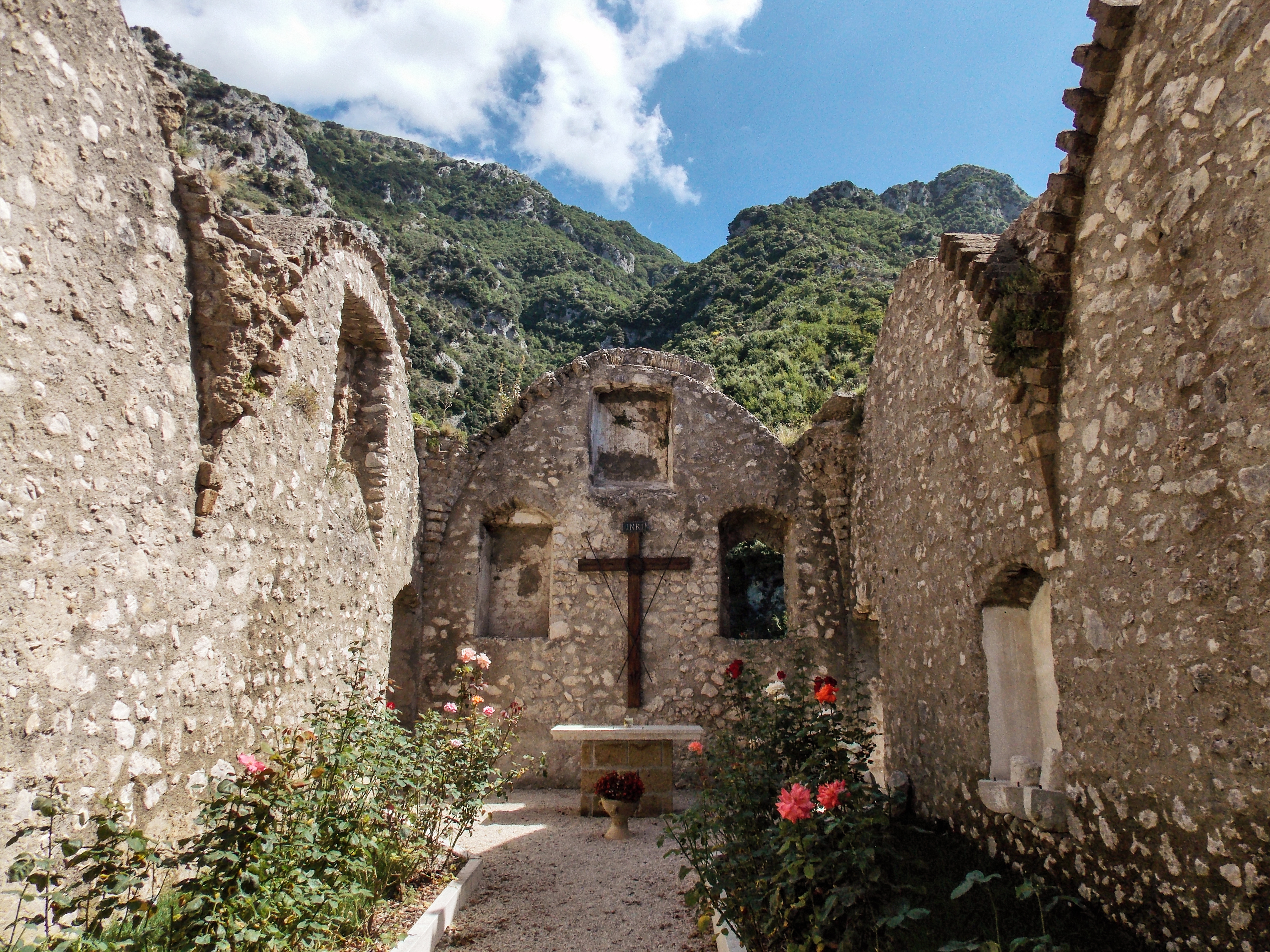 Il santuario della Madonna del Taburno a Bucciano (BN)